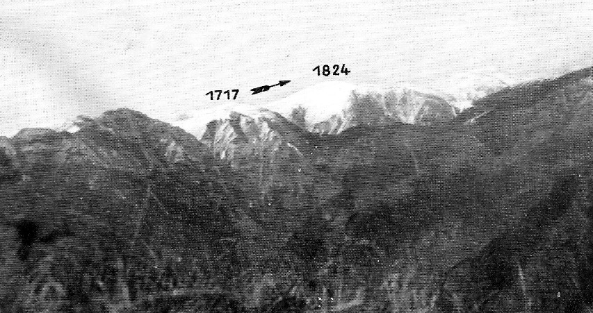 Höhe 1717 und 1821, Rumänien 1916